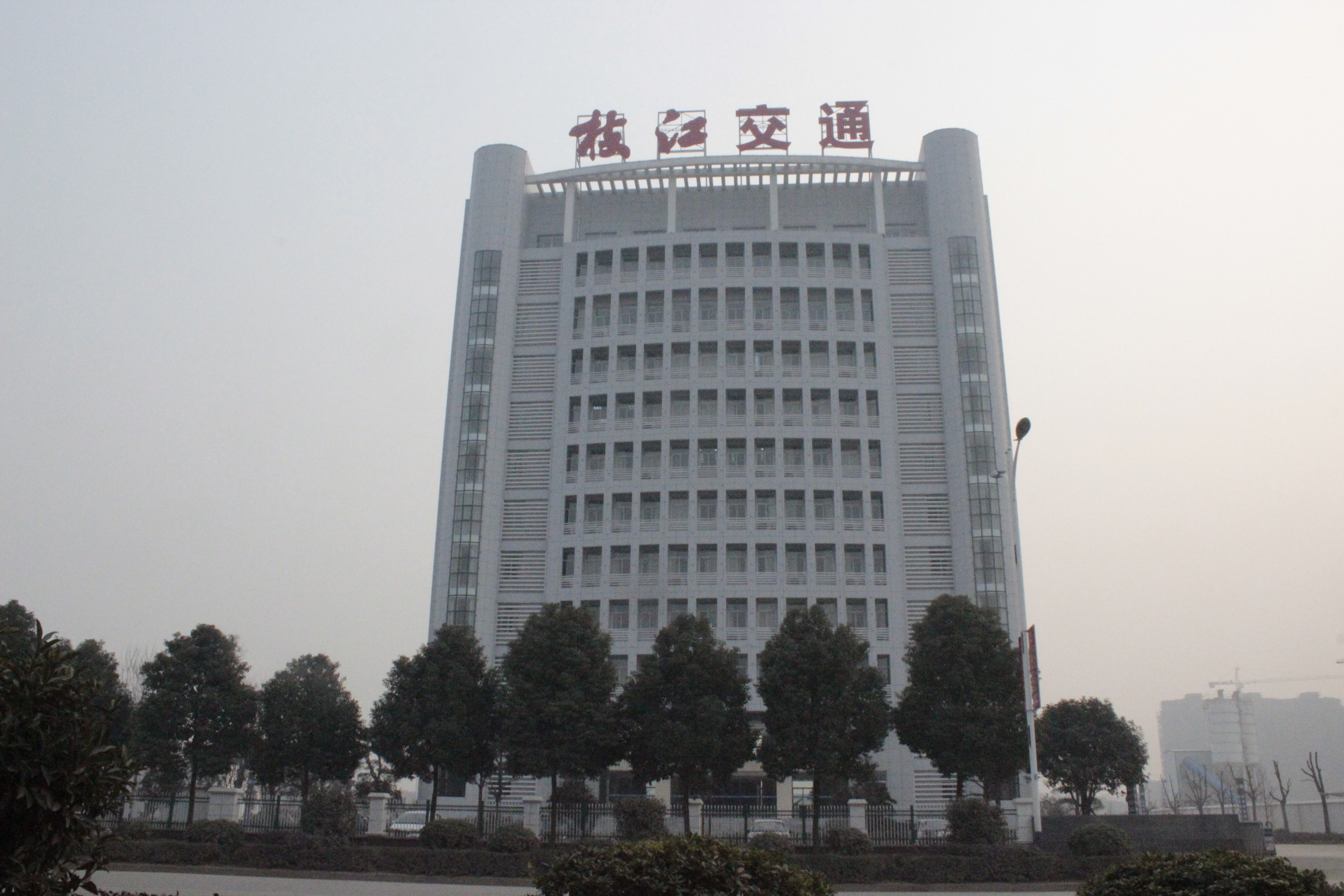 枝江 枝江交通局 枝江大发展 枝江 当阳枝江 宜昌枝江